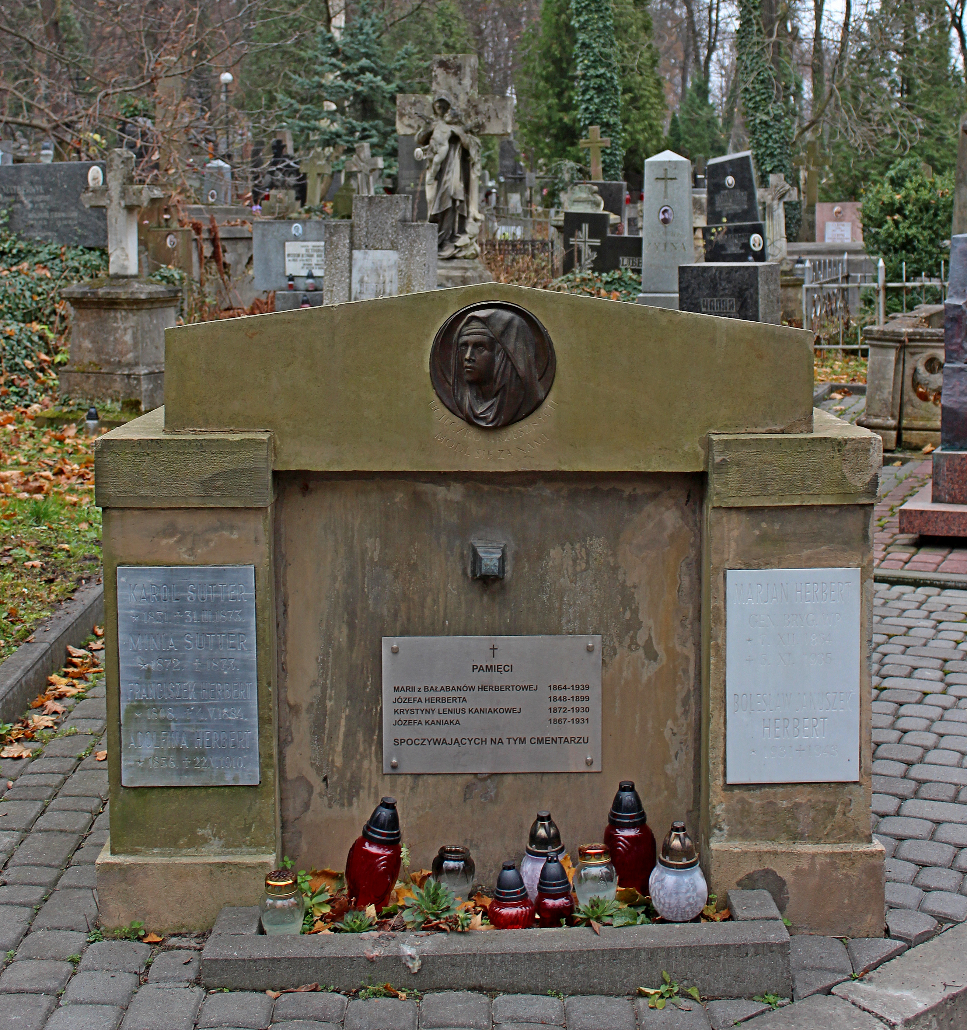 Гробовецьу якому похований М. Герберт. Личаківський цвинтар , поле № 51.